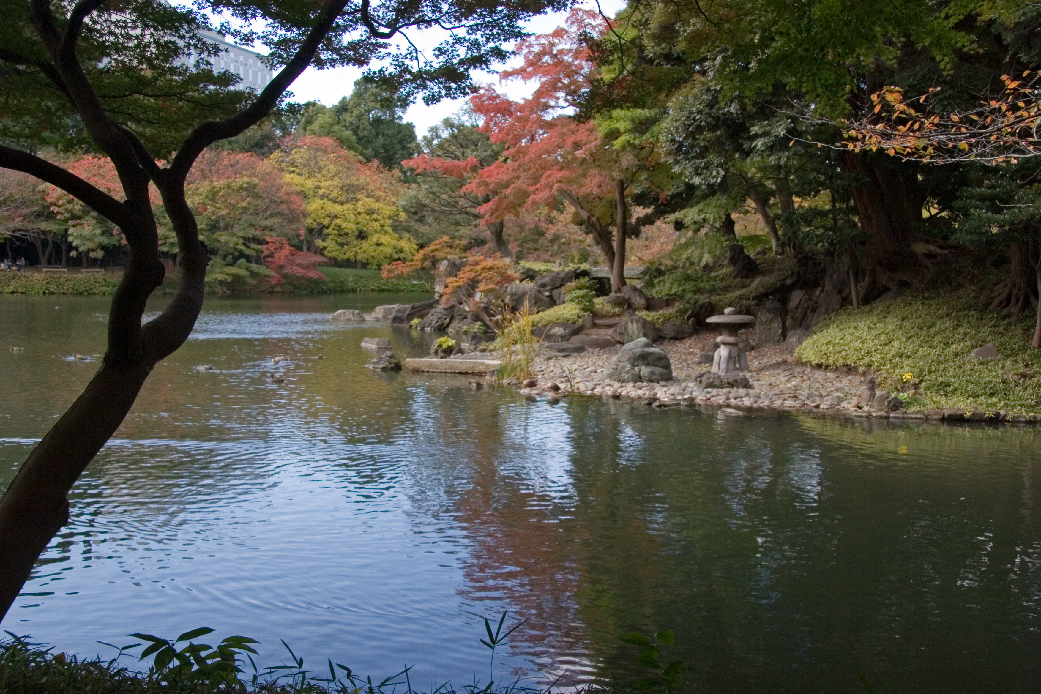 Koishikawa Korakuen garden (Tokyo, Japan) - Osensui (lake) and Horaijima (island)